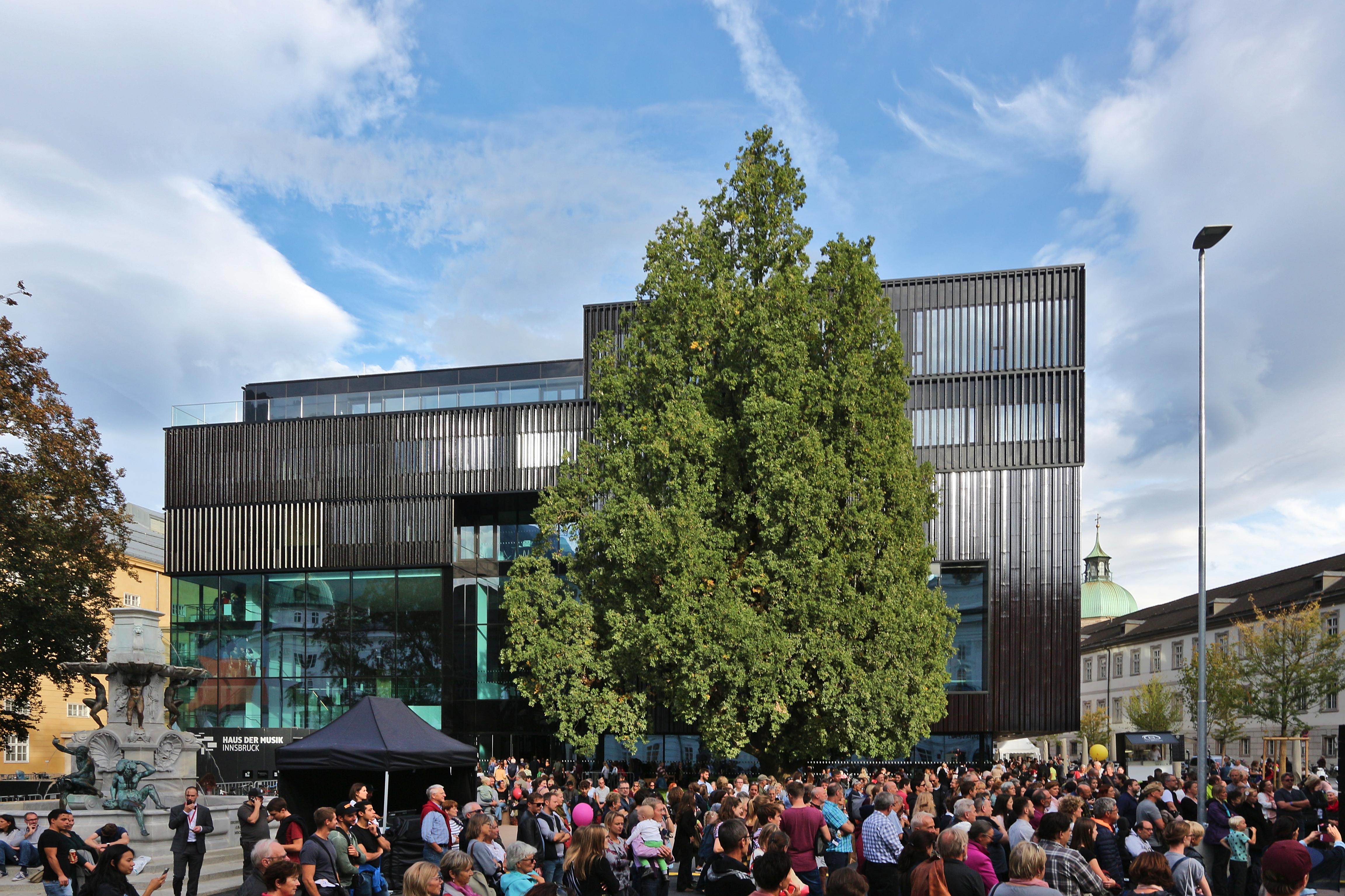 Tag der offenen Tür am 2018-10-06 This media shows the natural monument in the Tyrol with the ID ND_101_24.